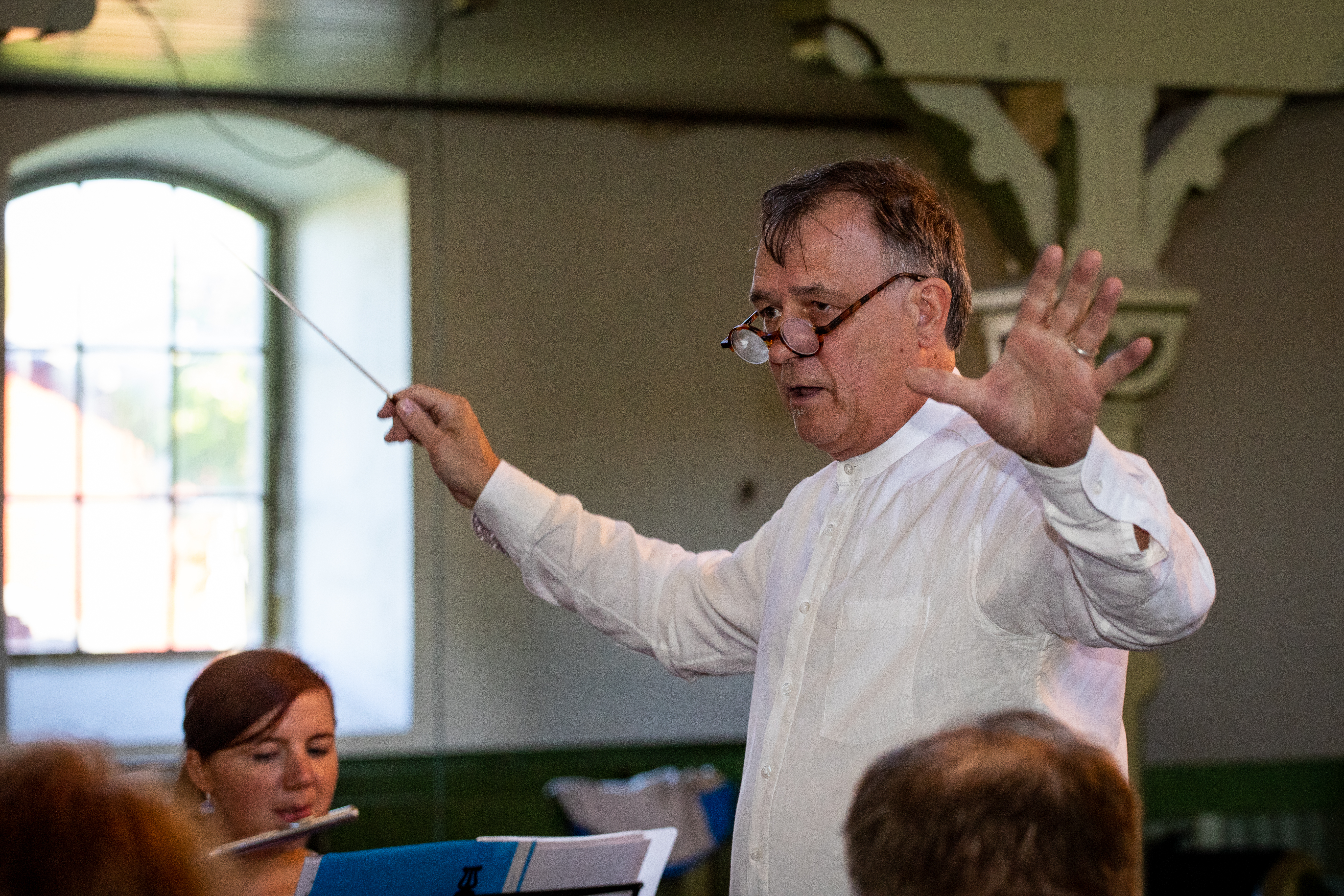 Bert Langeler juhatab Pühajärve 23. puhkpillipäevade koondorkestrit Rõngu kirikus